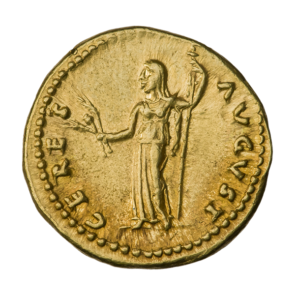 Ауреус. Веспасиан. Ок. 78—79 гг. (реверс). Надпись CERES AVGVST. Церера (богиня плодородия) стоит, влево; в правой руке держит два пшеничных колоса, в левой — скипетр.